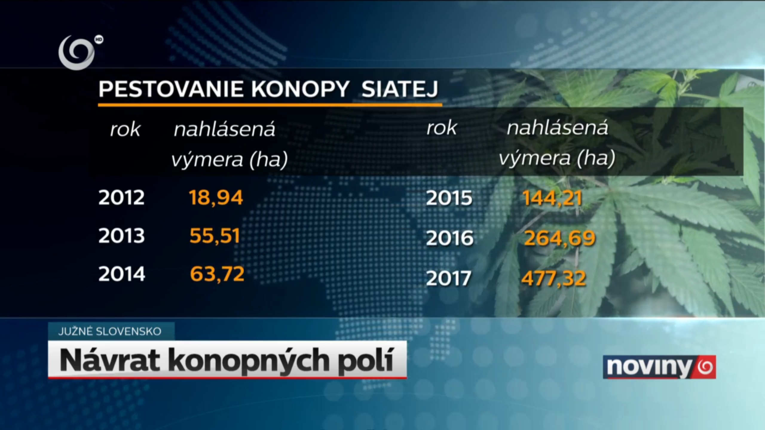 Pestovanie konopy siatej, Odvysielané v správach TV JOJ, 13.02.2019